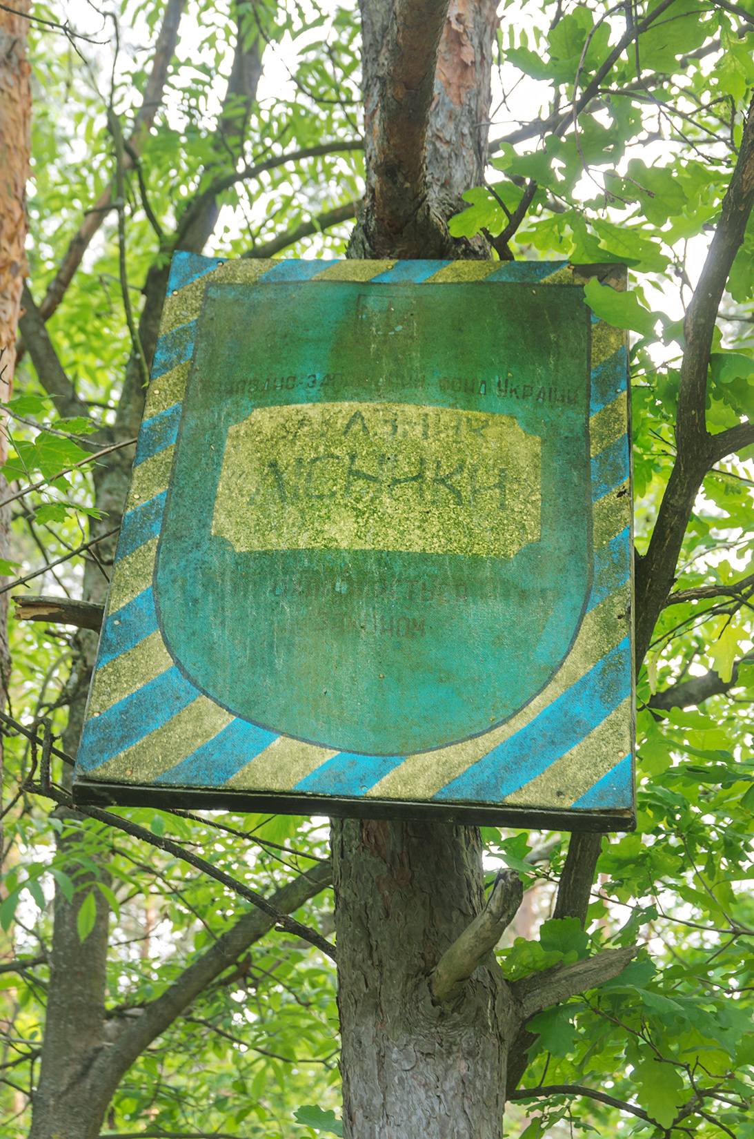 Лісники, Голосіївський район